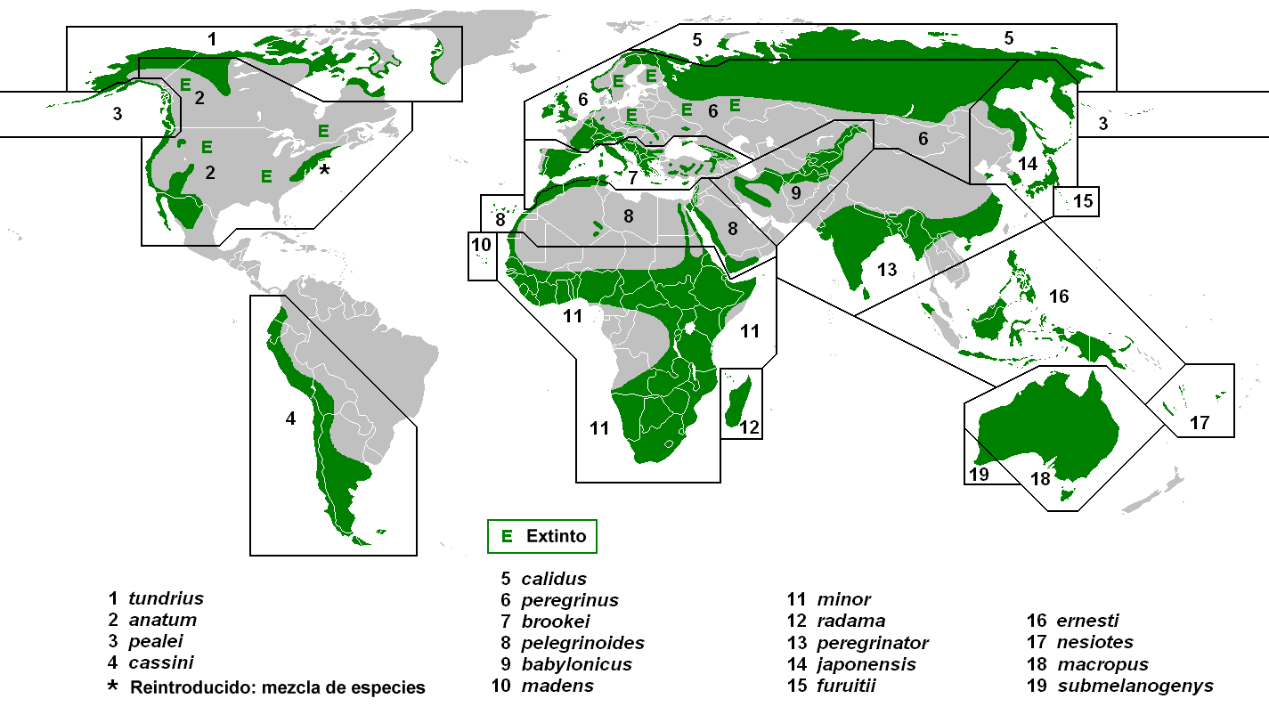 Rango geográfico de cría de las subespecies del Falco peregrinus.